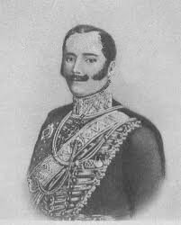 Багратион-Имеретинский, Дмитрий Георгиевич (1802-1845) - грузинский царевич, российский генерал-майор.